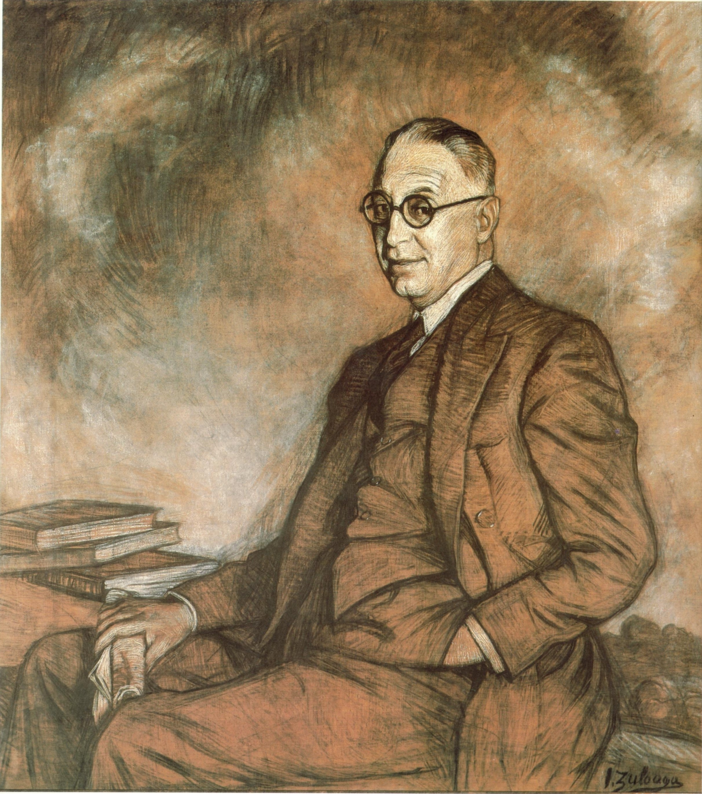 Alejandro Fernández de Araoz